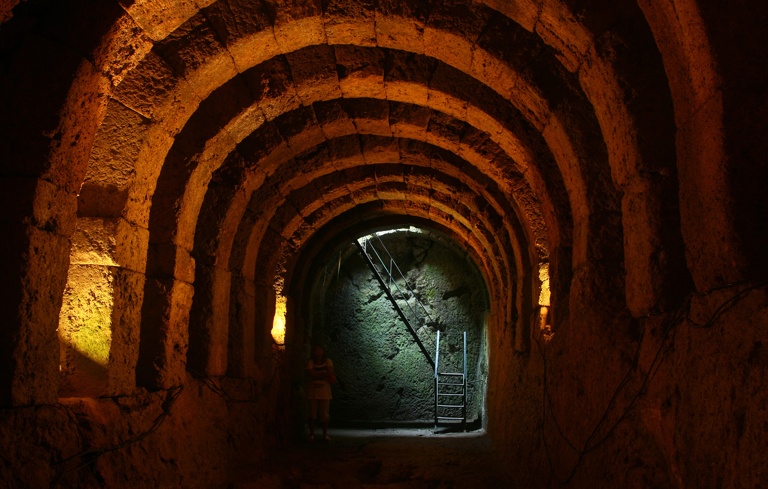 Νεκρομαντείο του Αχέροντα«Νεκρομαντείο του Αχέροντα»